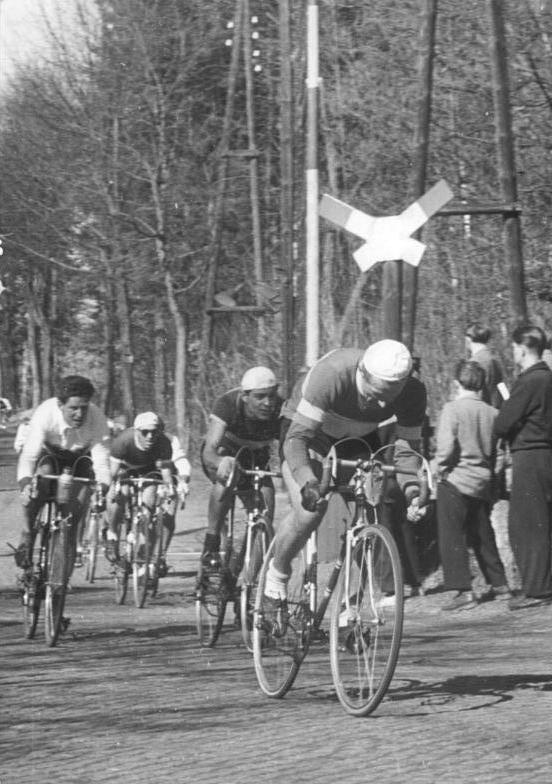 Lothar Meister Zentralbild Funck 8.4.56 Täve Schur bei Berlin-Angermünde-Berlin auf dem zweiten Platz Am Sonntag, dem 8.4.56 fand das Radrennen Berlin-Angermünde-Berlin (152 km) statt. Henning konnte bei diesem Rennen dem Verdienten Meister des Sports Täve Schur auf den zweiten Platz verweisen. UBz: Lothar Meister-II führt das Feld an.